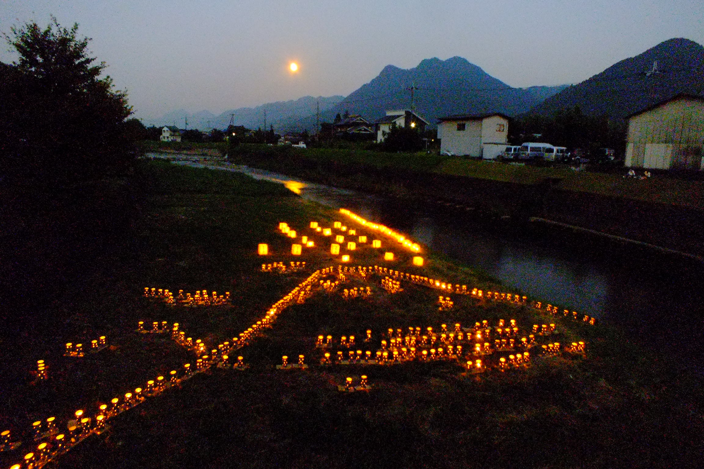 2015-07-31Minazuki-Festival Kokuryo,Tamba,Hyogo-Japan 国領水無月祭り